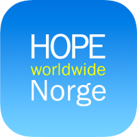 Logo HOPE worldwide Norge